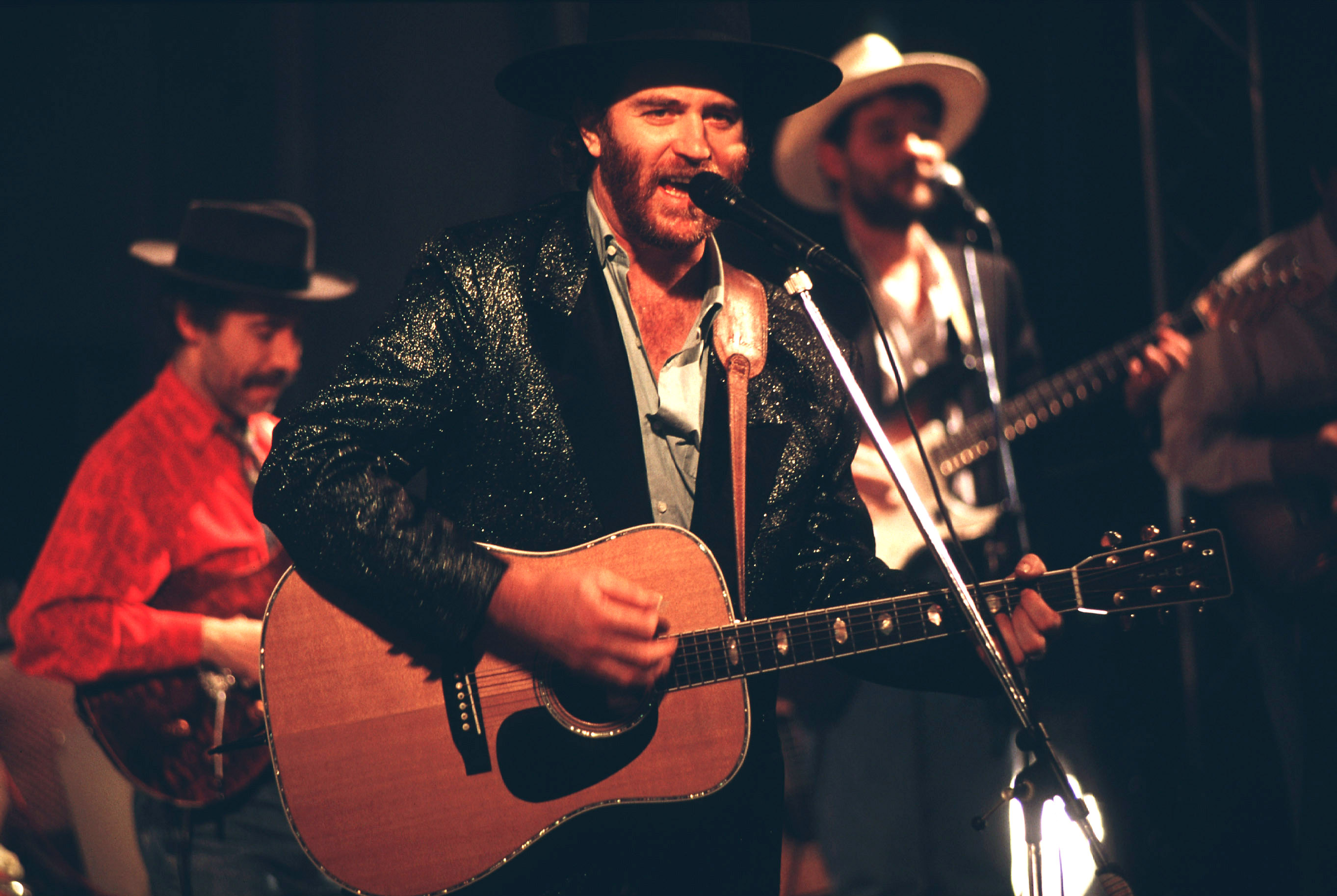 Il cantautore italiano Francesco De Gregori